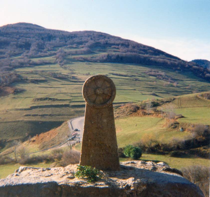 Montsegur